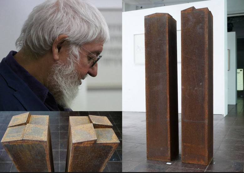 Montage aus einem seitlichen Portrait des Künstlers sowie 2 seiner Werke